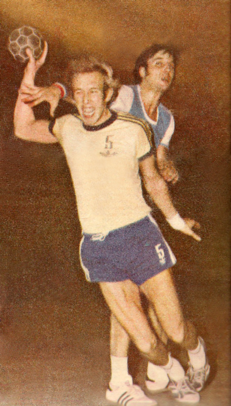 Ryszard Bissinger